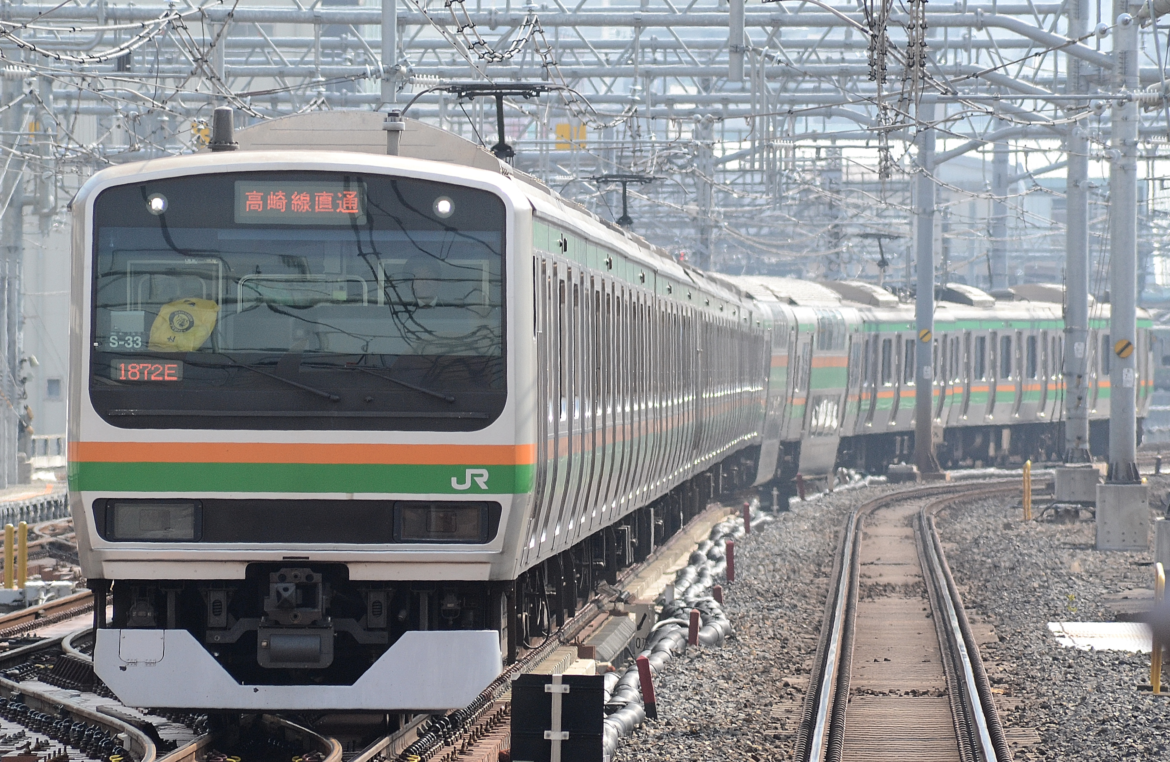 3月14日に開業した上野-東京間の東北縦貫線を走行する高崎線直通の｢上野東京ライン」のE231系（御徒町駅ホームから撮影）